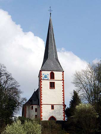 Die Bergkirche in Bensheim-Auerbach